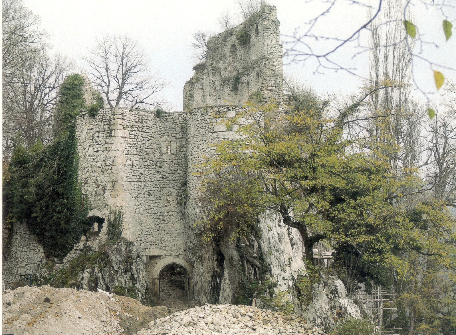 Grad Planina pri Sevnici okr. l. 2000